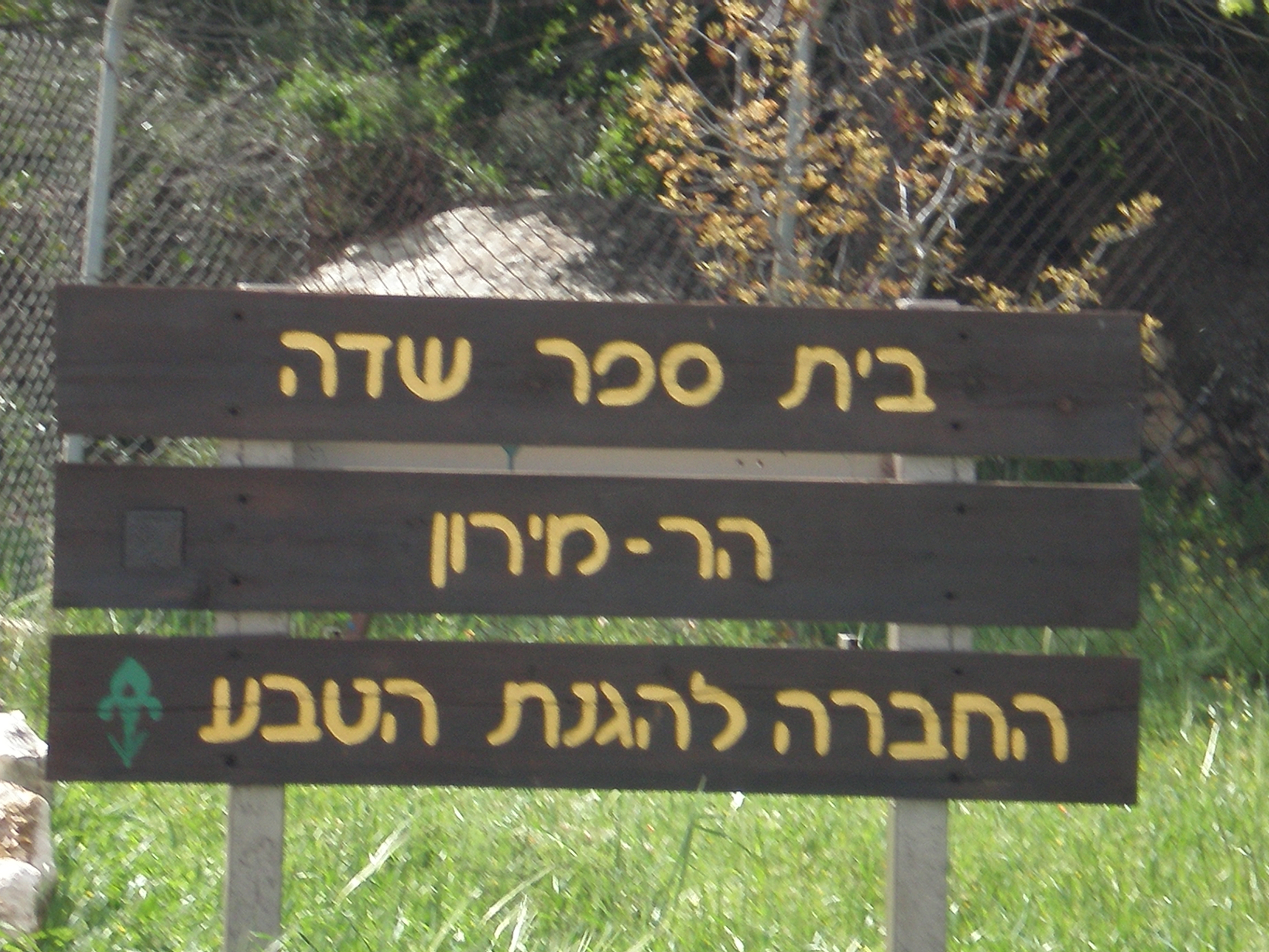 Mount Meron Bet-Sefer Sade (בית ספר שדה הר מירון) sign.